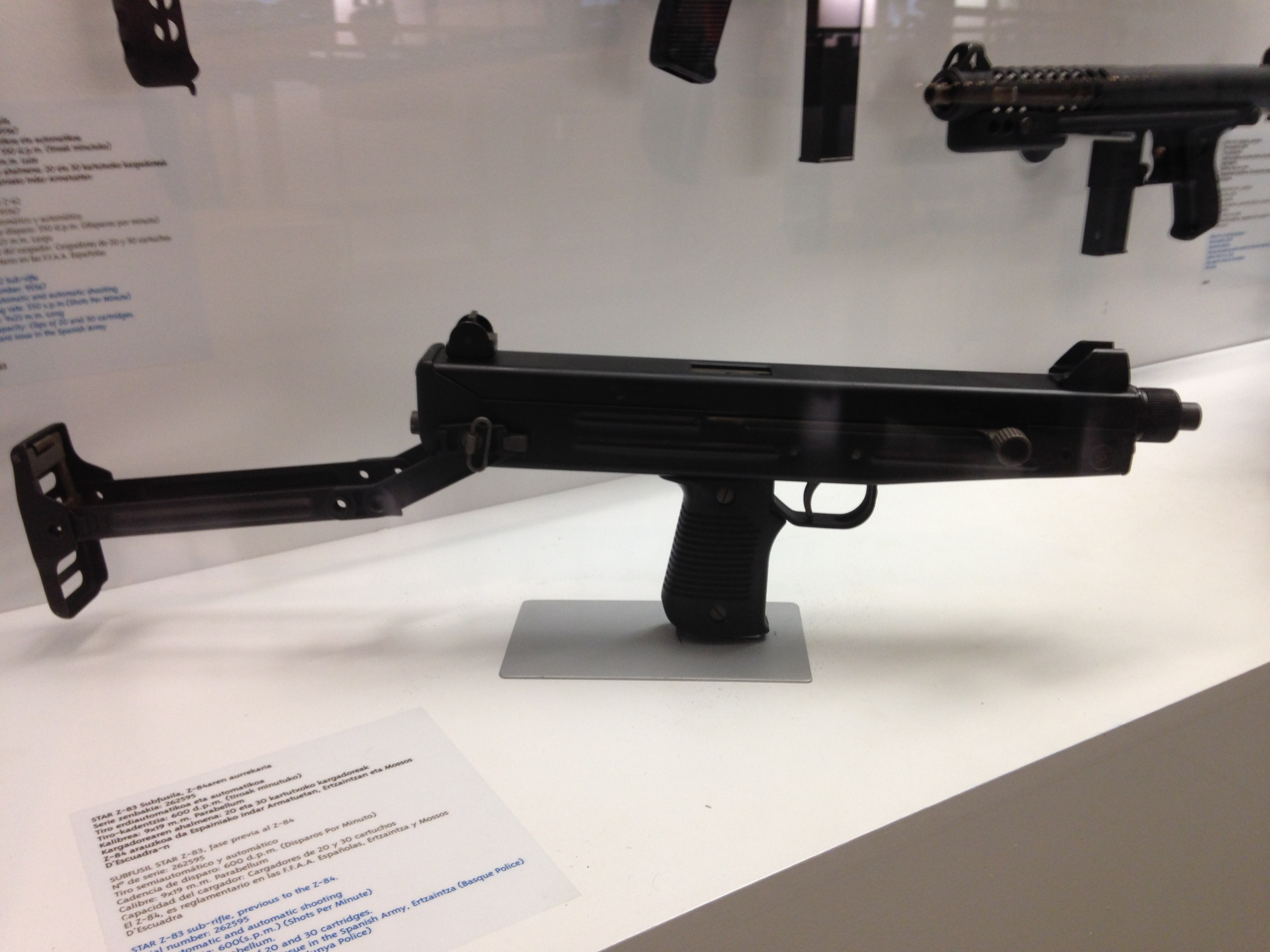 Museo de la Industria Armera de Éibar. Subfusil Z-84 fabricado por STAR de Eibar.